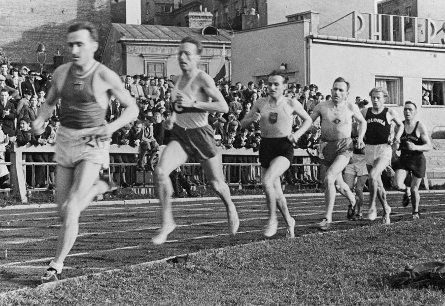 1939 Warszawa bieg na 5000 metrów Janusz Kusociński Wacław Soldan Andras Csaplar Józef Noji Kazimierz Herman